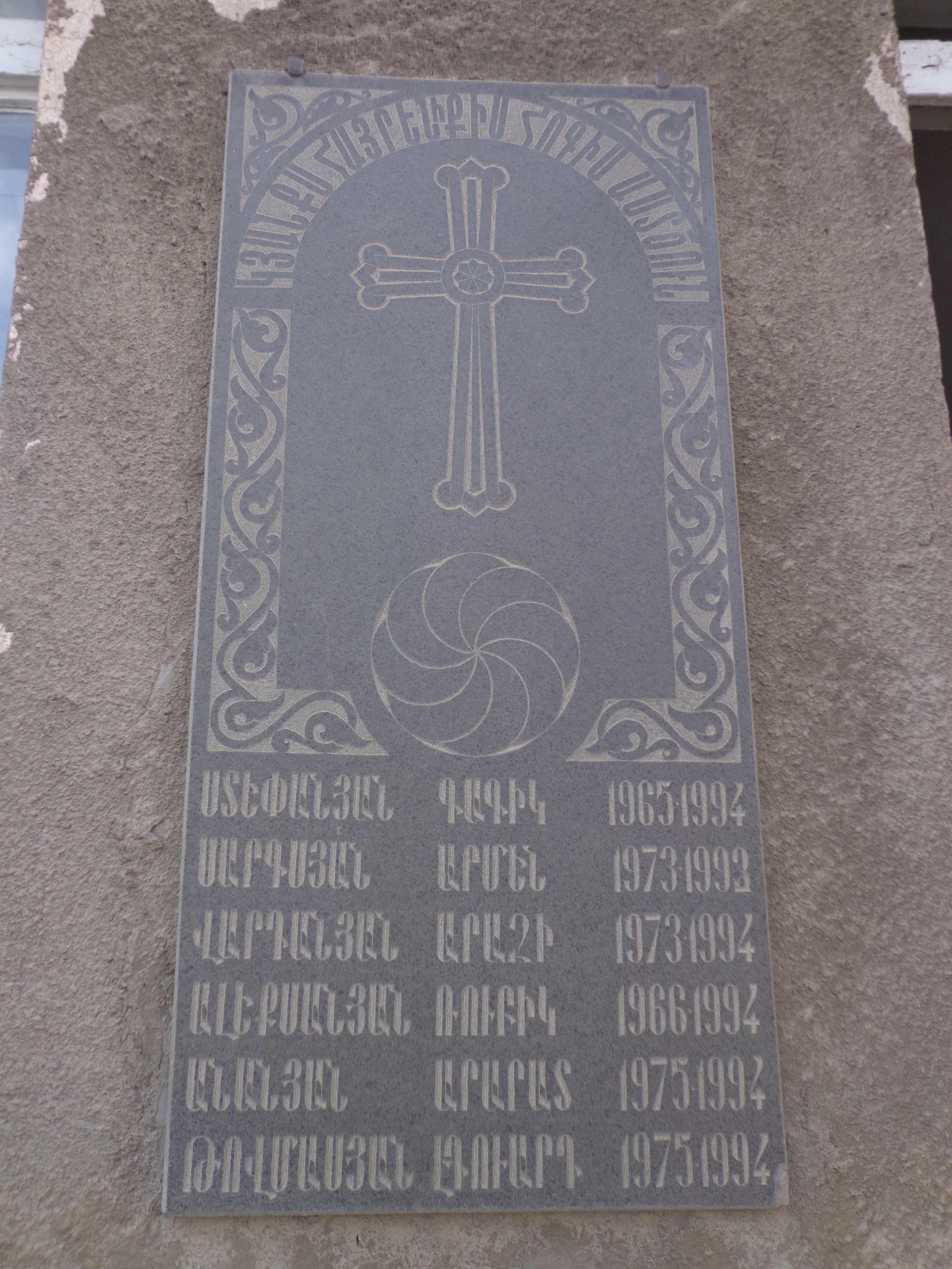 Երևանի Գ.Ստեփանյանի անվան թիվ 135 դպրոցի զոհված շրջանավարտ-ազատամարտիկների հուշաքարը